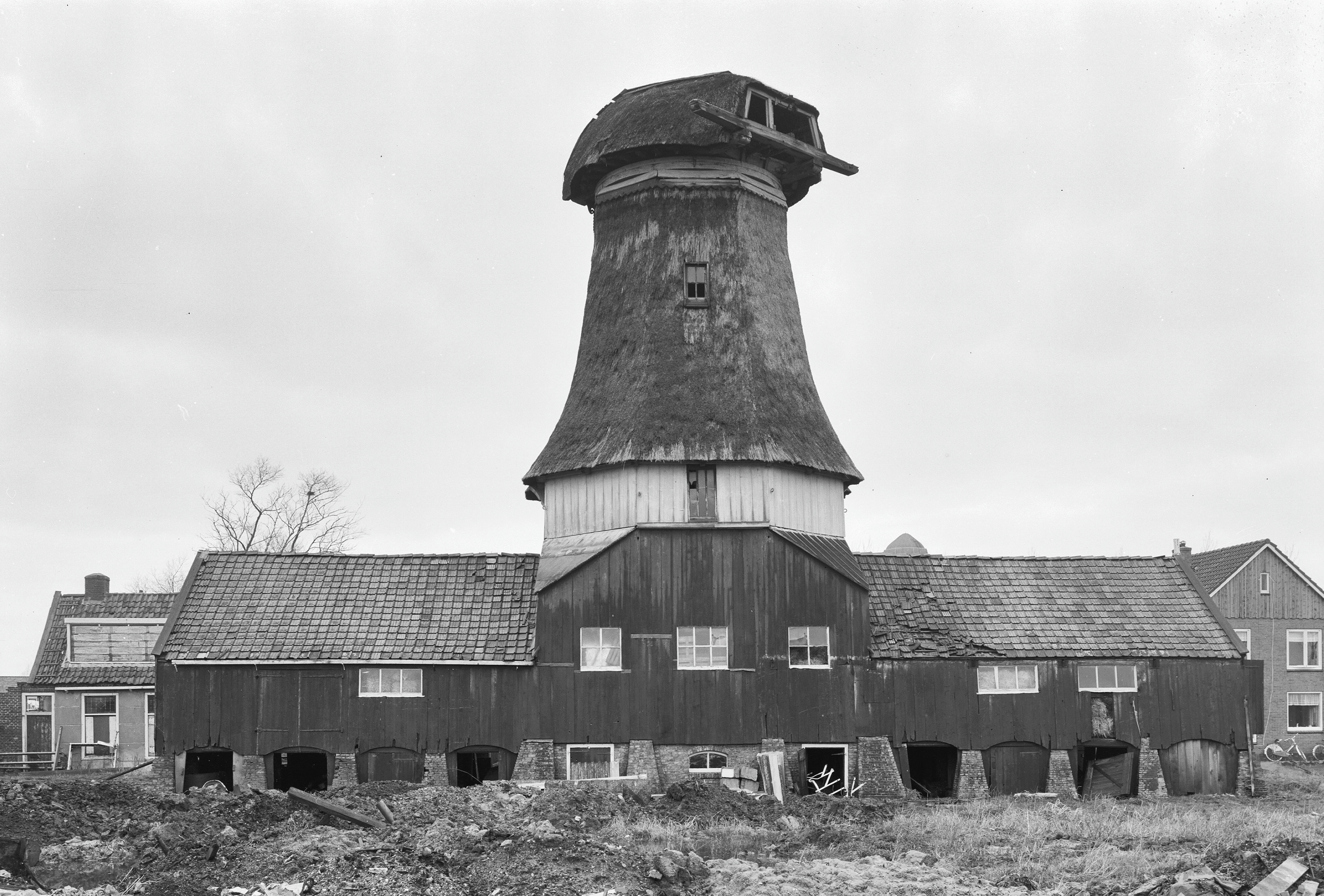 Diversen: Houtzaagmolen